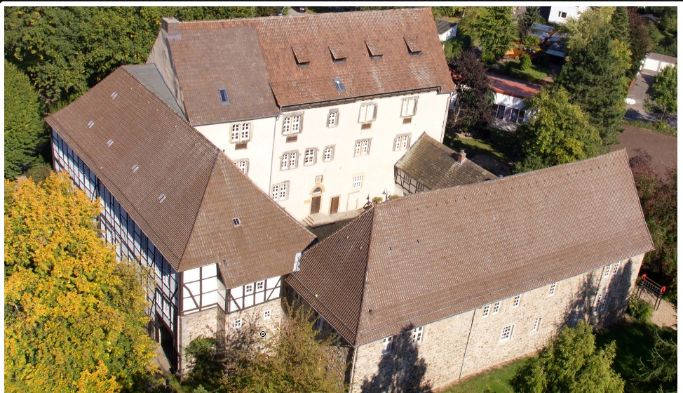 Die Domänenburg Aerzen aus der Luft